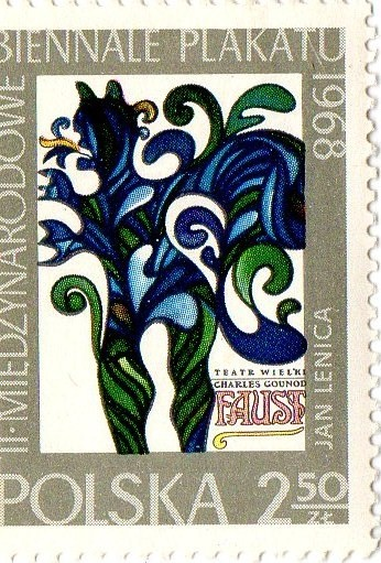 II Miedzynarodowe Biennale Plakatu (1968).